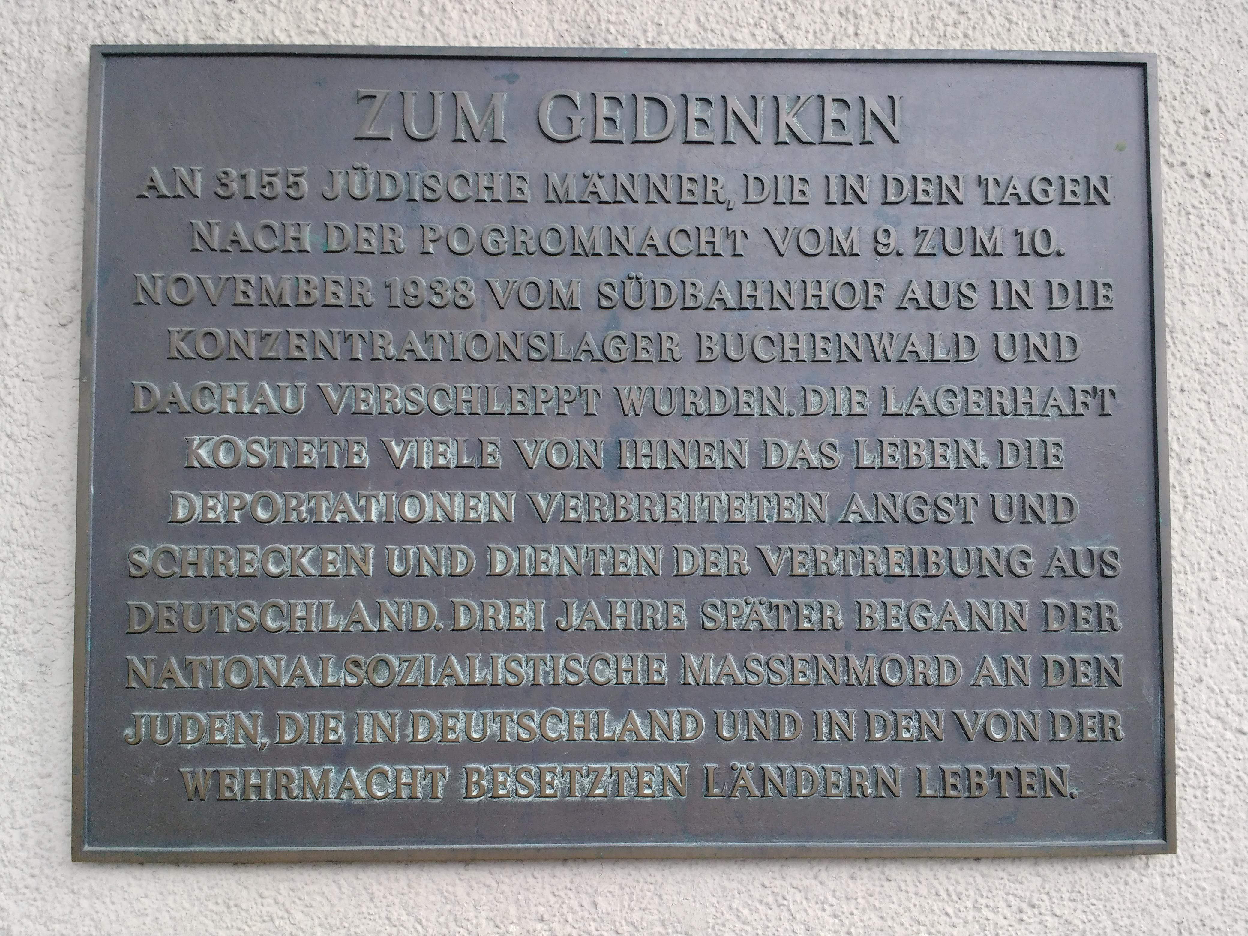 Die Tafel erinnert an das Schicksal der 3155 jüdischen Männer, die in den Tagen nach der Pogromnacht deportiert wurden. Sie wurde im Jahr 2011 am Hauptportal des Südbahnhofs angebracht.